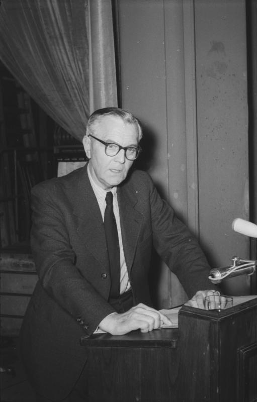 Pressekonferenz des Ausschusses für Deutsche Einheit. Am 2.7.1954 fand im Haus der Presse in Berlin eine Pressekonferenz vor in- und ausländischen Journalisten statt, auf der unter anderem der ehemalige Feldmarschall Paulus sprach. UBz: Der ehemalige Kommandeur der 6. Armee Feldmarschall Paulus